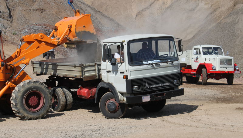 ein Magirus-Deutz MK (links) und ein Magirus-Deutz Eckhauber (rechts) beim Beladen